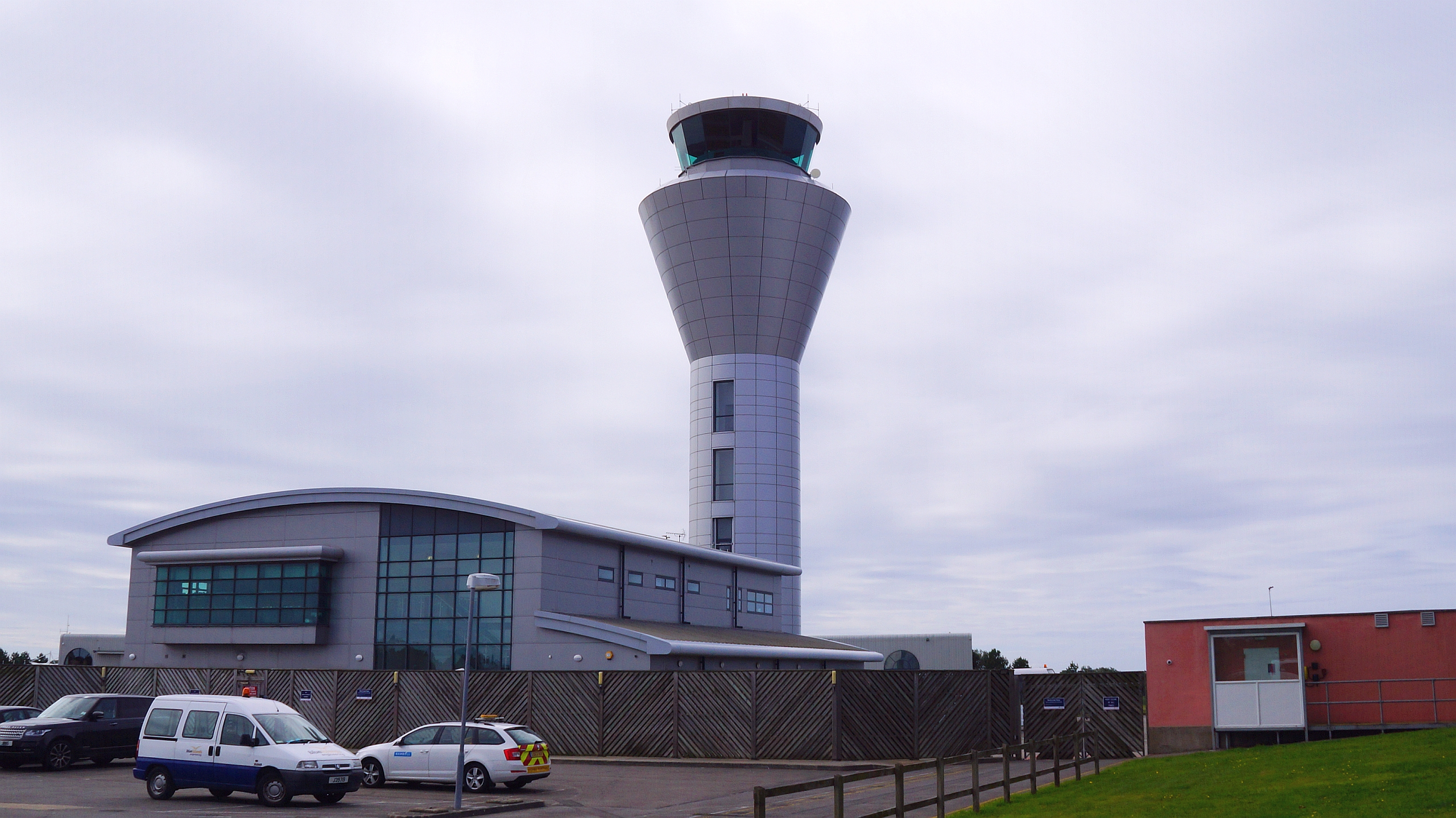 Tower vom Jersey Airport IATA JER - ICAO EGJJ Flughafen Jersey Channel Islands Great Britain Großbritannien Foto Wolfgang Pehlemann DSC04980.jpg